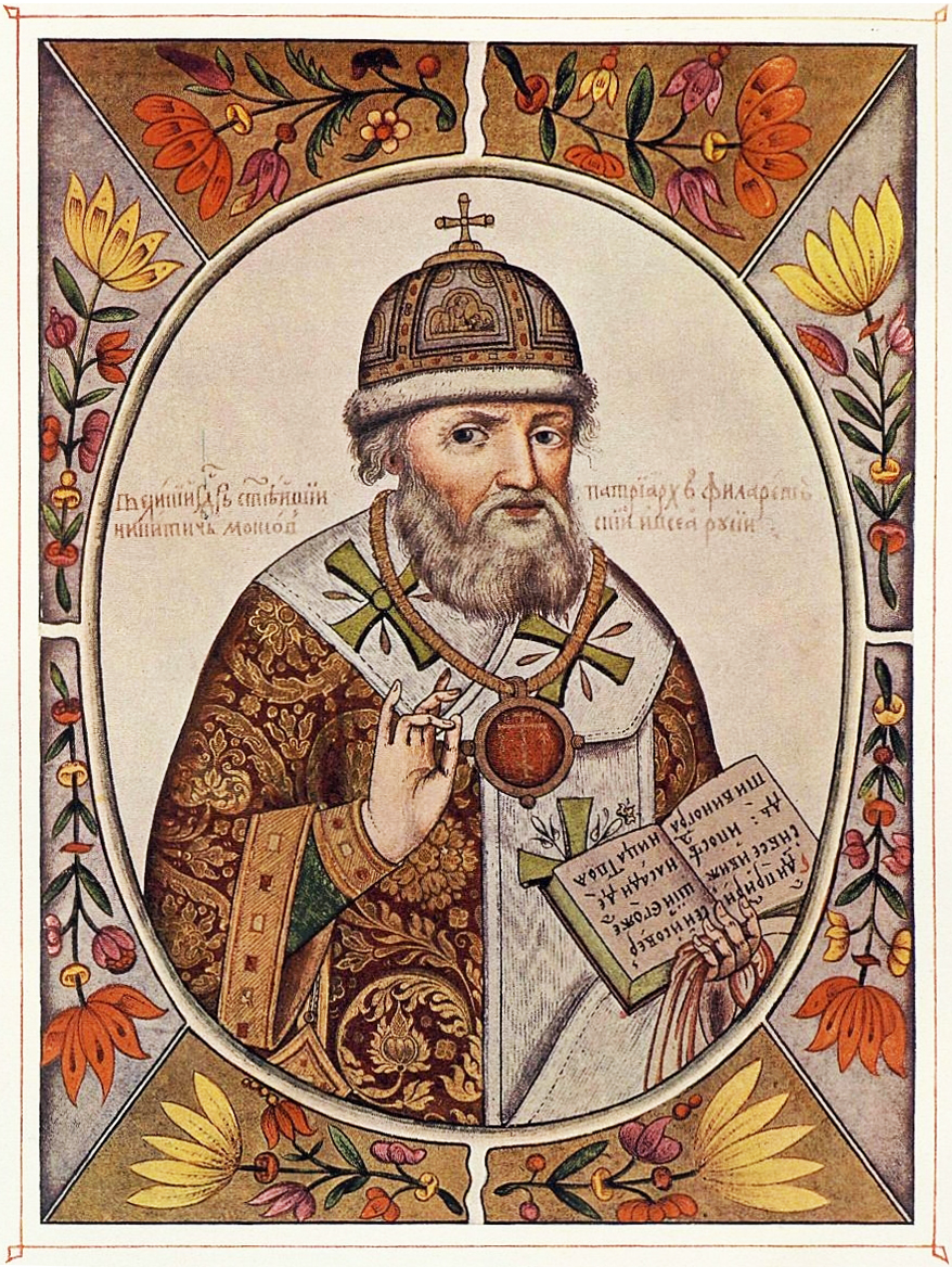 Philaret